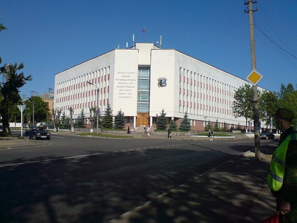 ВА ВПВО ВС РФ